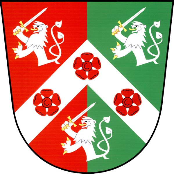 Znak obce Verušičky